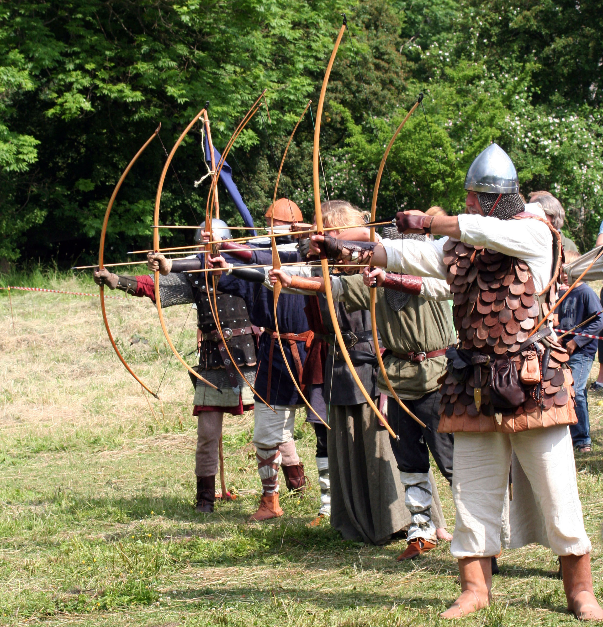 Bueskytter ved middelaldermarkedet ved Esrum Kloster